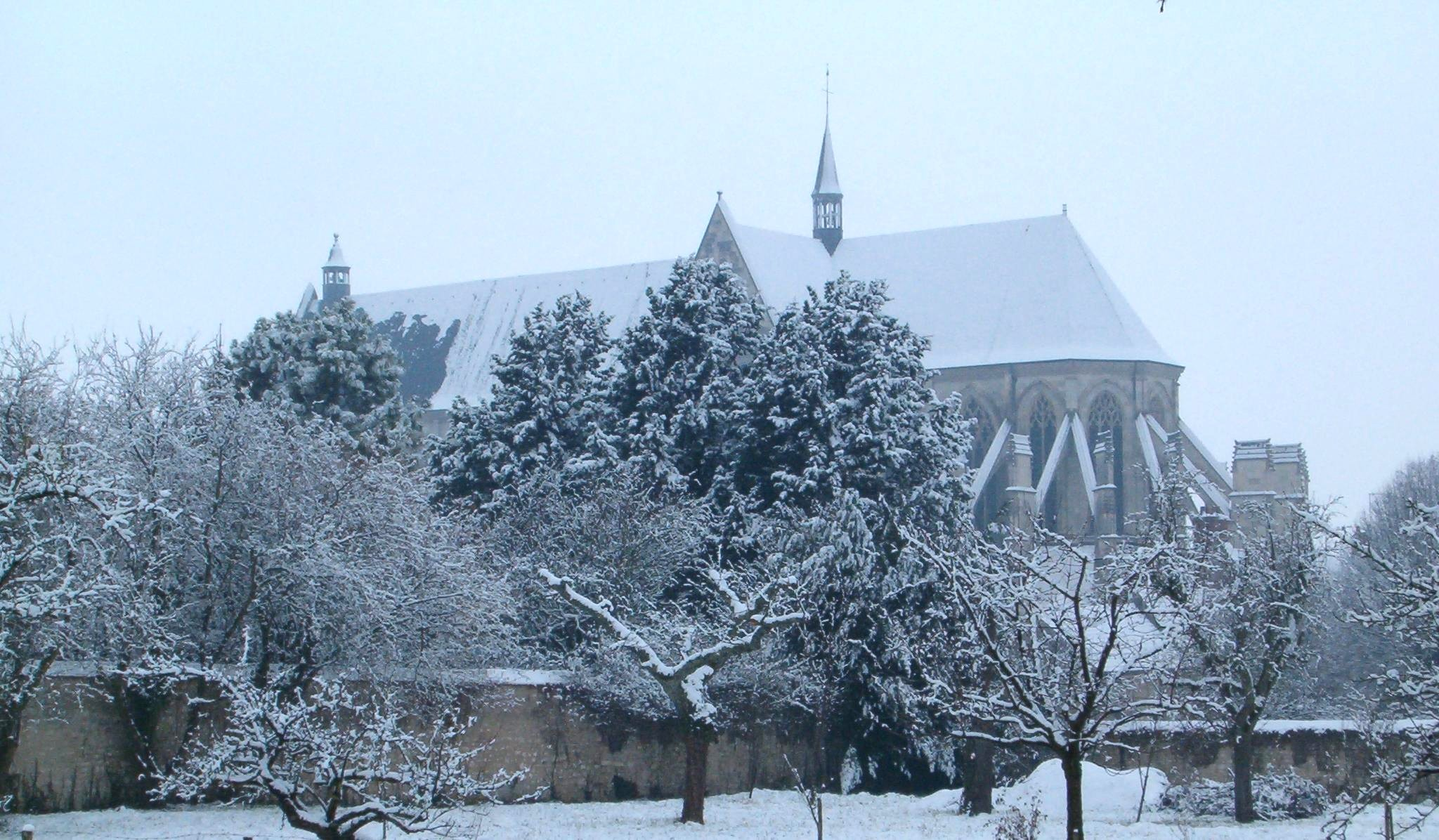 Basilique de Cléry-Saint-André sous la neige